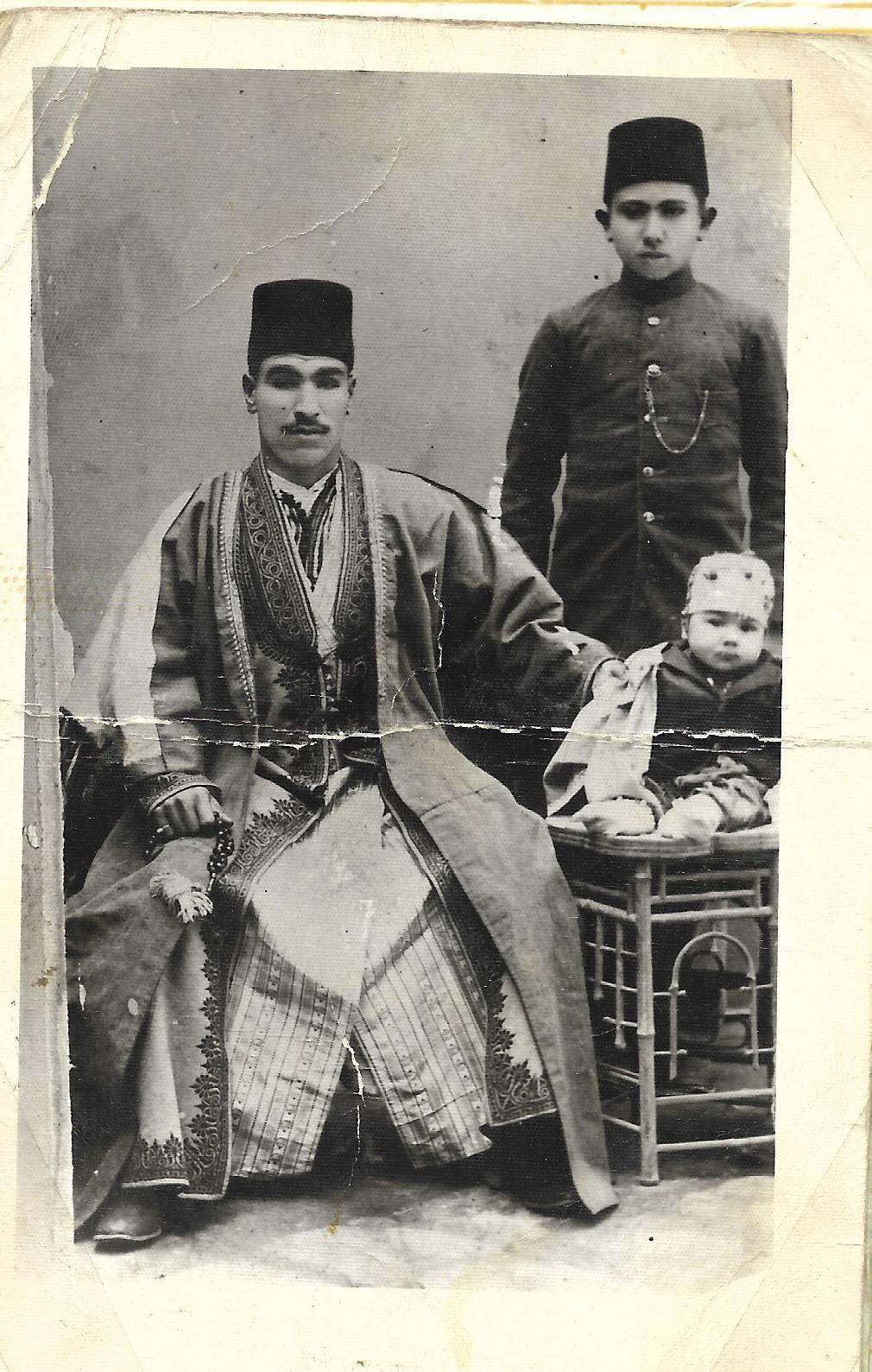 الوجيه البغدادي نعمان محمد عبد المحسن آل جميل (1885-1942) مع أبنه يحيى القاعد بجانبه والواقف خلفه عبد الجليل بن الحاج أحمد آل جميل سنة 1924 في بغداد، ولقد توفى نعمان آل جميل في 19 ربيع الثاني 1361 هجري الموافق 5 أيار 1942م.